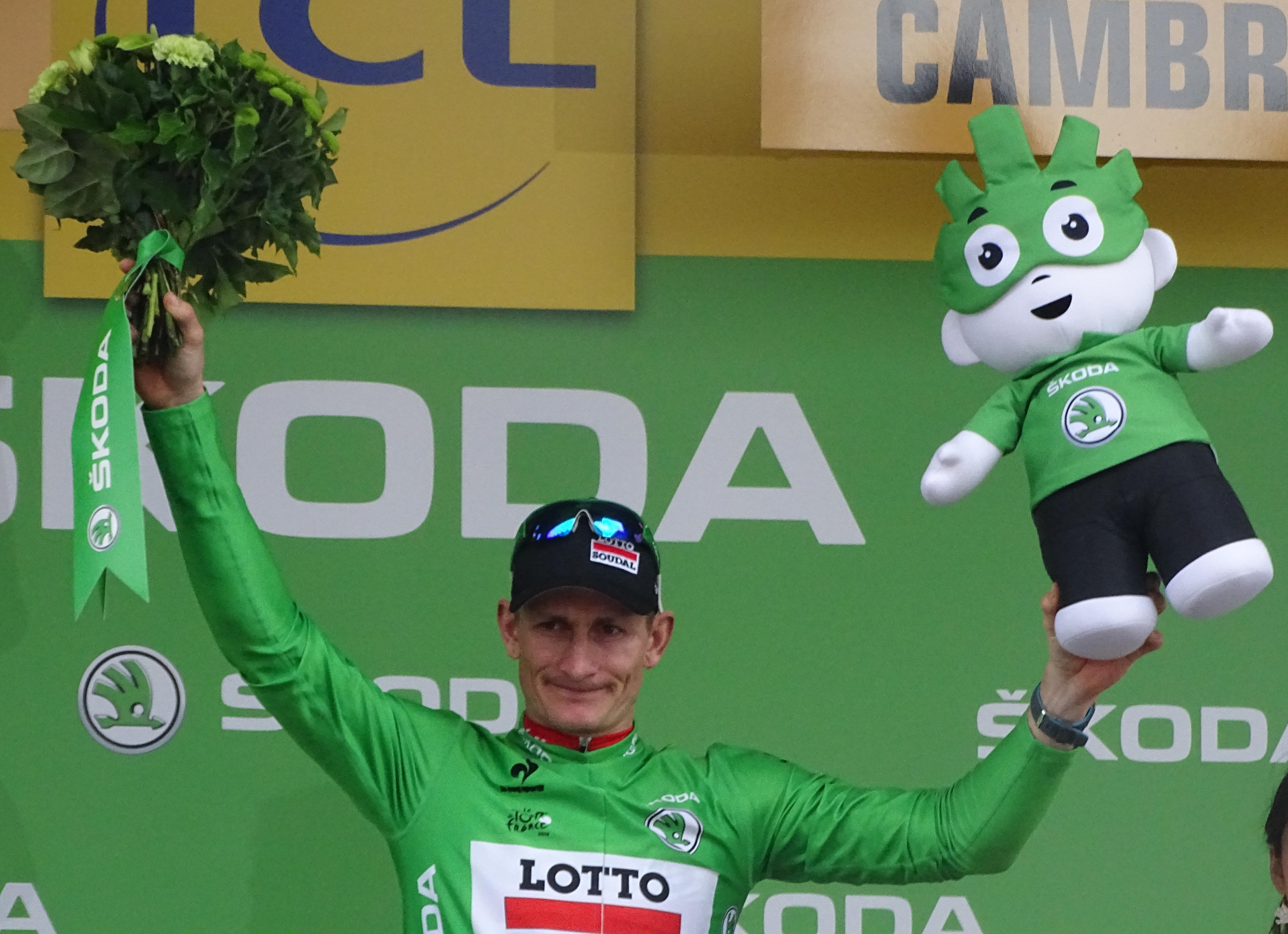 Reportage réalisé le mardi 7 juillet à l'occasion de l'arrivée de la quatrième étape du Tour de France 2015 à Cambrai, Nord-Pas-de-Calais, France.